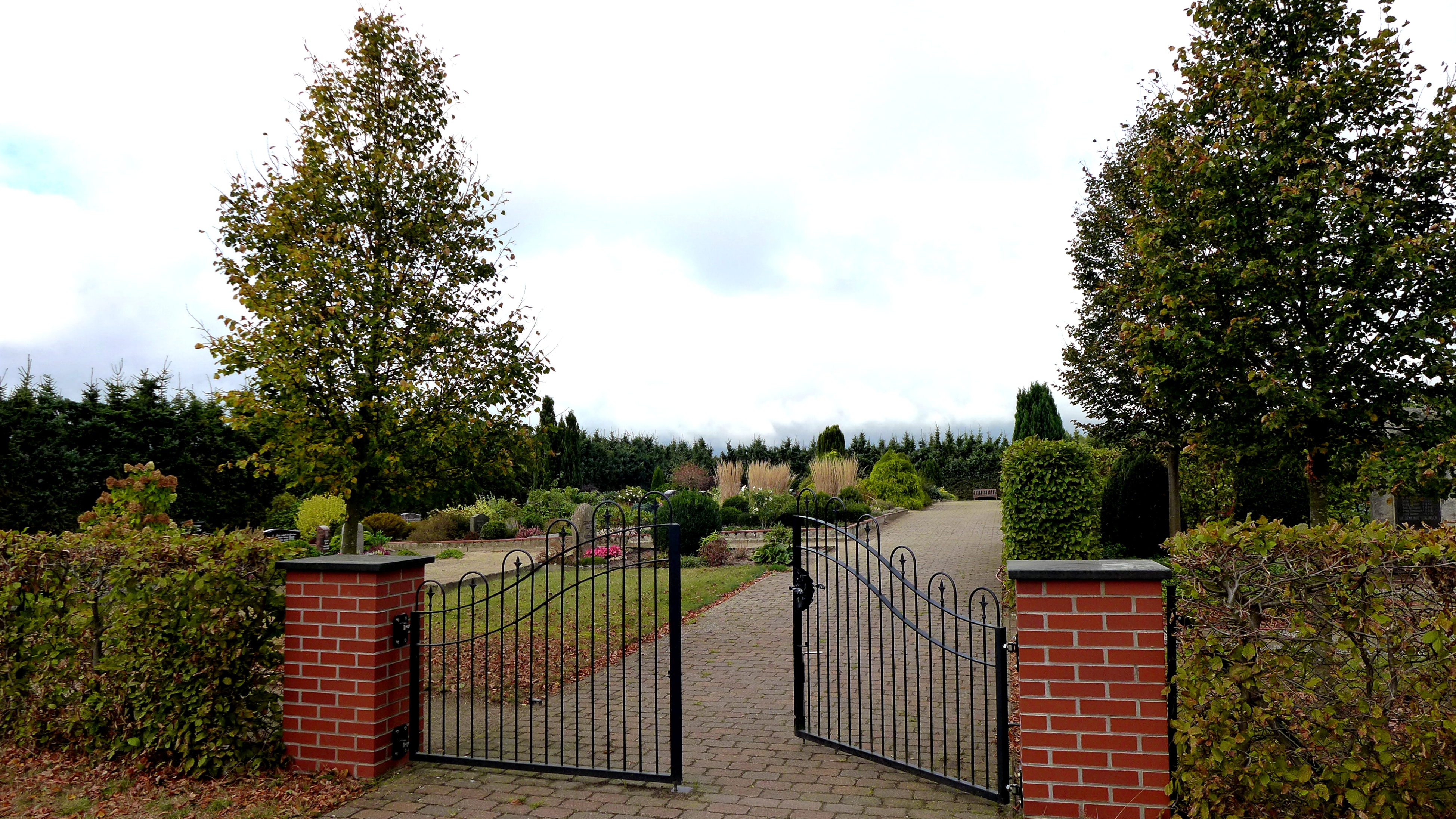 Friedhof für die Gemeinden Groß Sehlingen und Klein Sehlingen, Ortsteile von Kirchlinteln. Aufnahmedatum 2016-10.